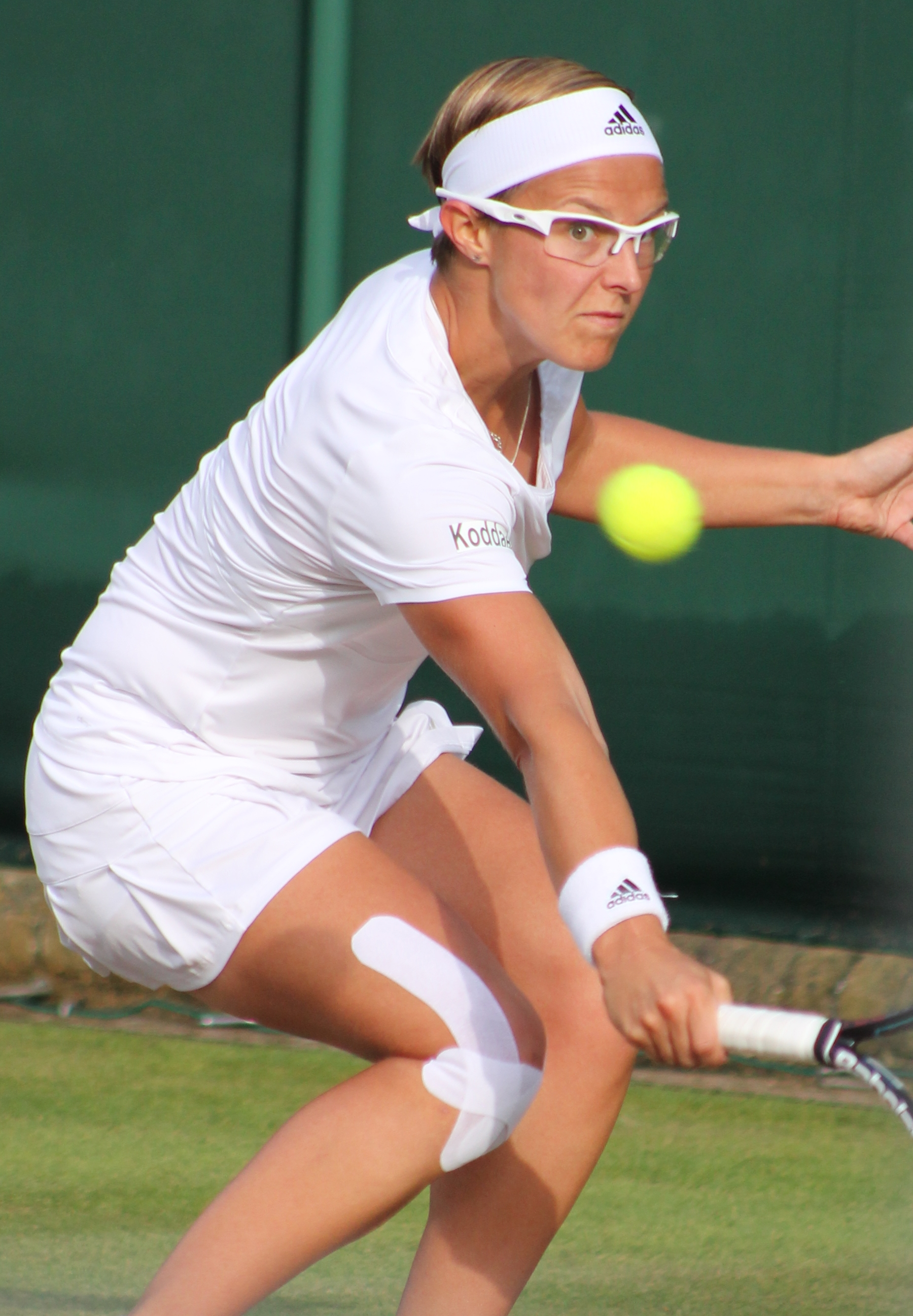 Flipkens WM14 (2)